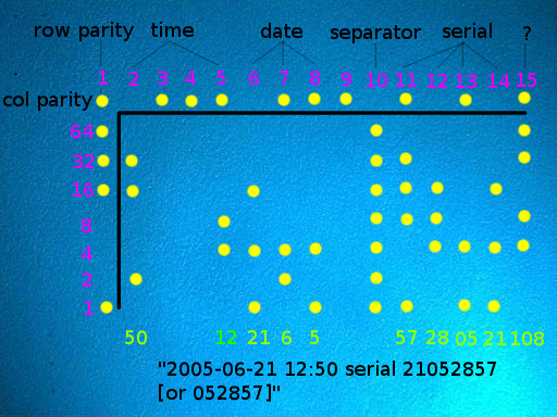 Dekodierung des Codes, den diverse Druckerhersteller verwenden, um Ausdrucke einem Drucker, Datum und Uhrzeit zuzuordnen, um dadurch den Urheber zu ermittlen